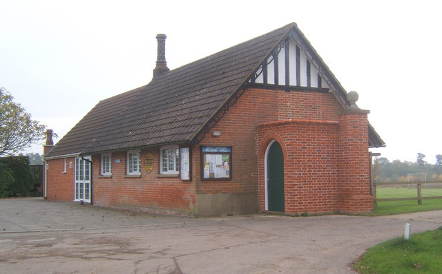 Brettenham village hall